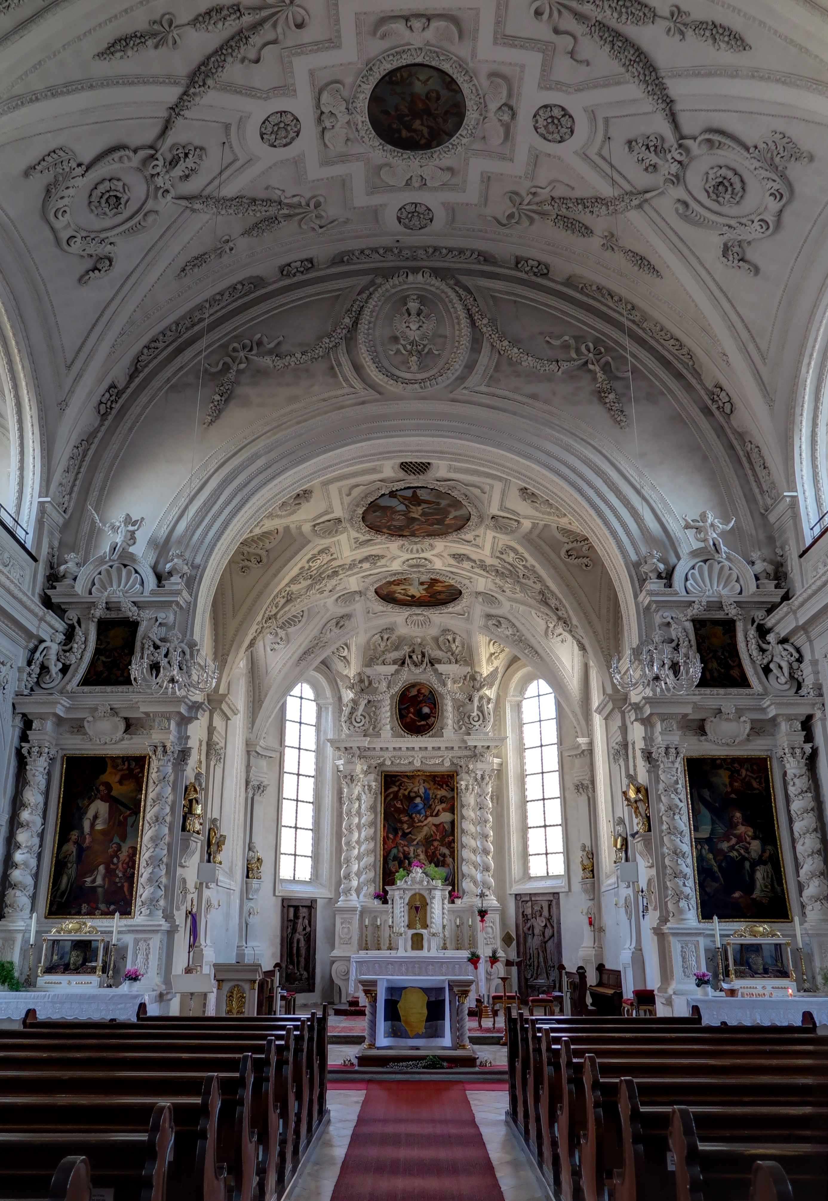 Deutschland, Bayern, Oberpfalz, Landkreis Schwandorf, Gemeinde Pfreimd, Pfarrkirche Mariä Himmelfahrt Altarraum